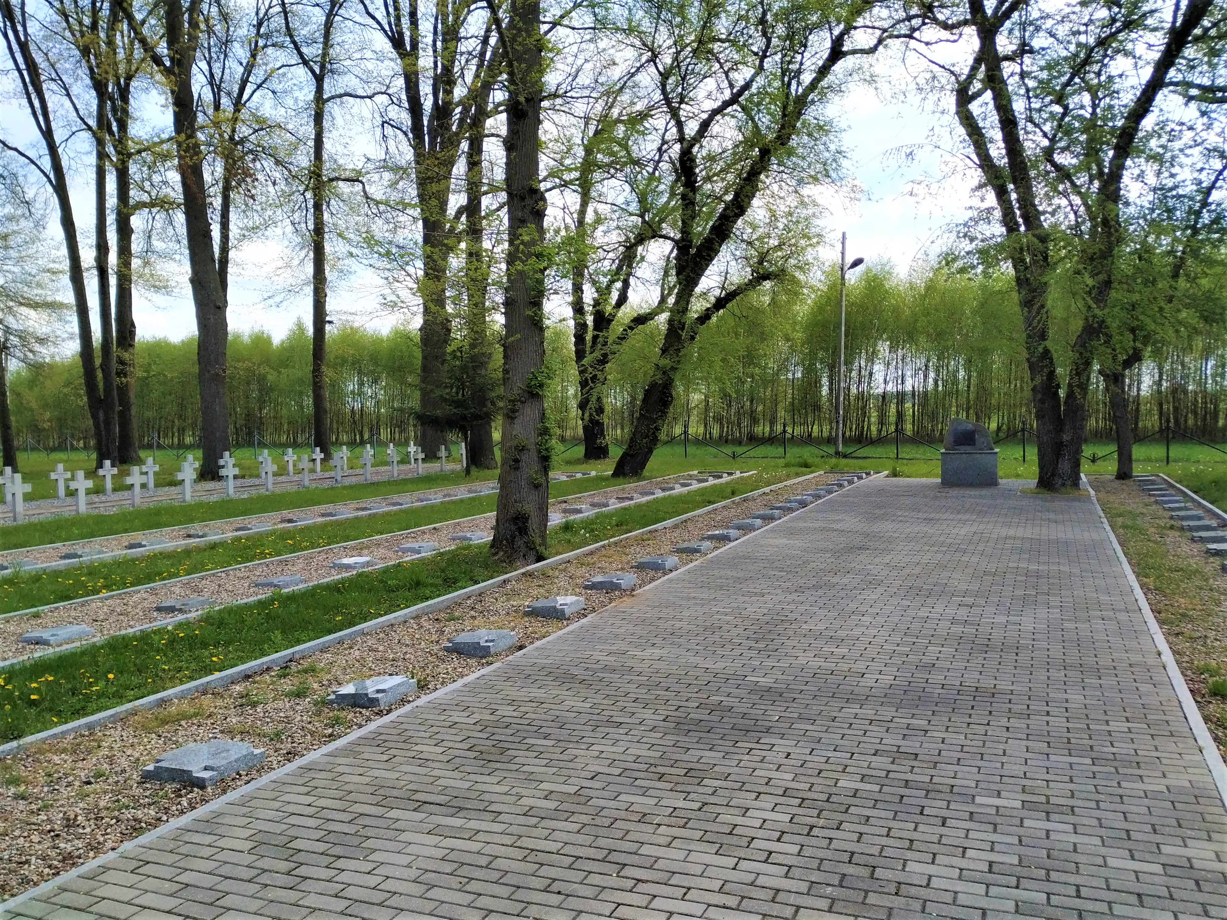 Cmentarz wojskowy przy ul. Strzelniczej w Łukowie